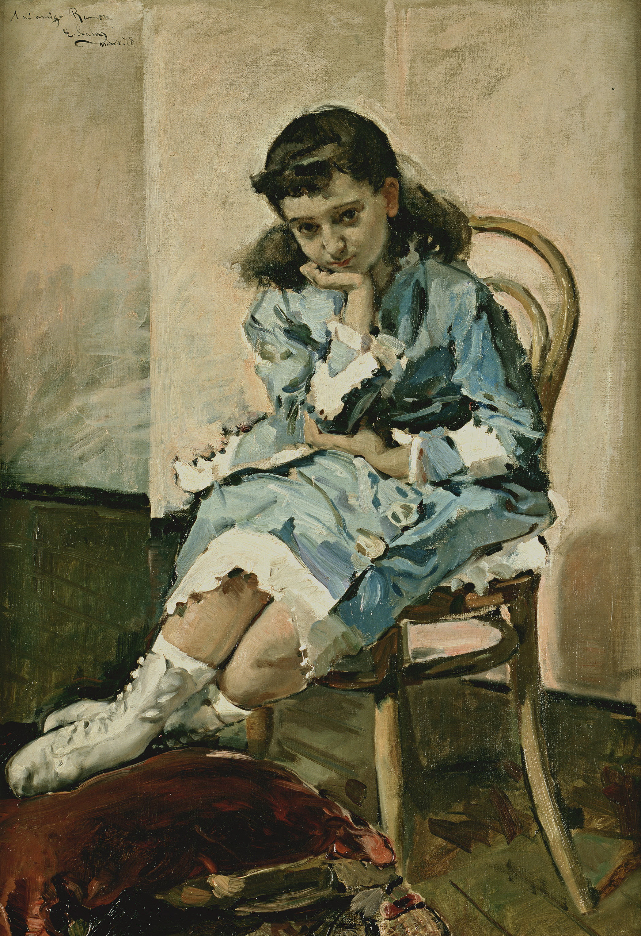 Espléndida imagen de la actriz María Guerrero (1867-1928), retratada en su niñez. Posa vestida con un traje azul y blanco, sentada sobre una silla de madera y apoyando sus pies sobre un almohadón de terciopelo rojo con mirada perdida y gesto serio. La pincelada, larga y gruesa, construye la figura a base de planos de color, evocando el arte de Rosales, y estableciendo un gran contraste entre el ajustado dibujo del rostro y la libertad expresiva del resto de los elementos que quedan abocetados en un ejercicio de libertad pictórica.